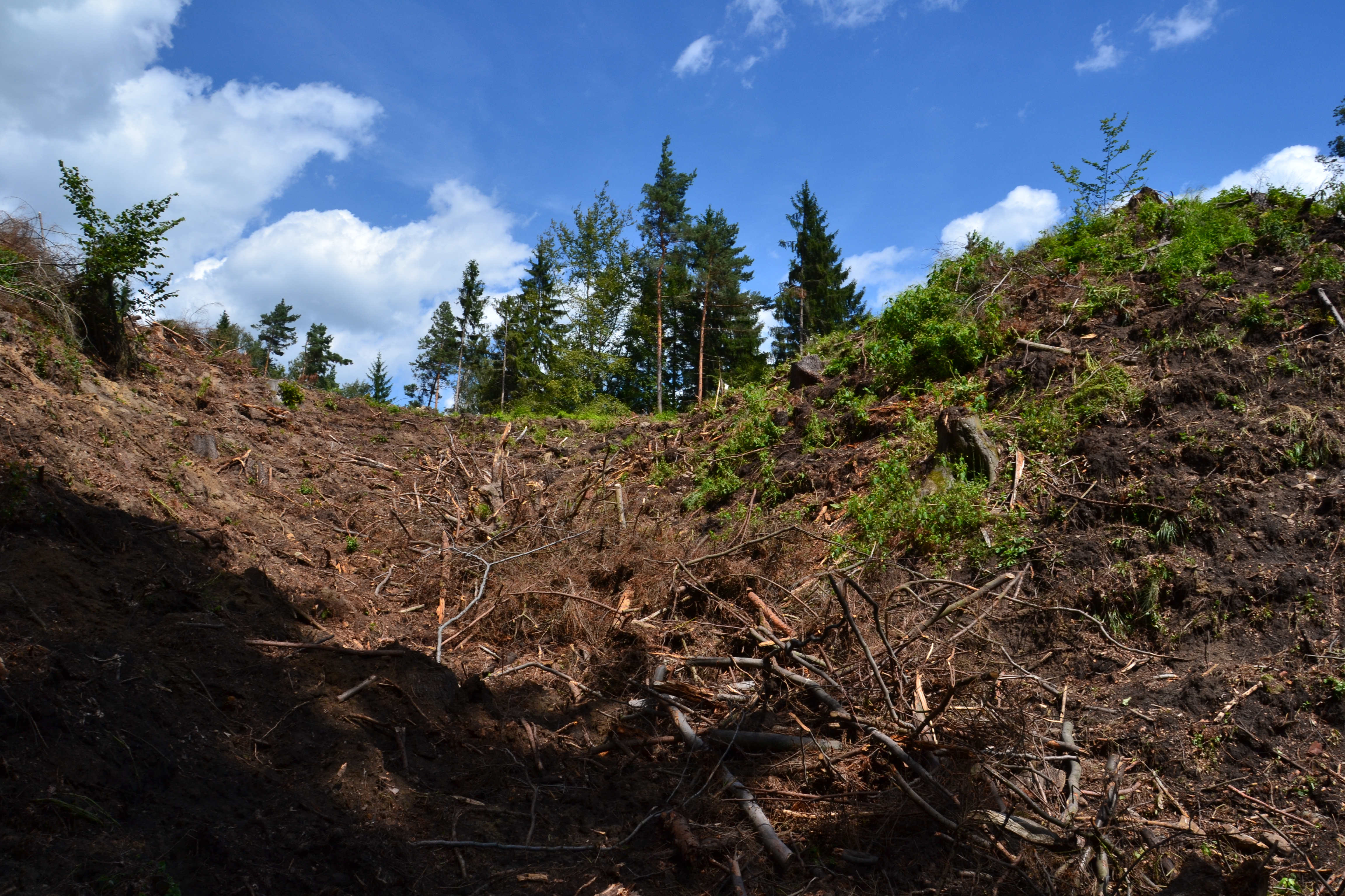 Šíjový příkop